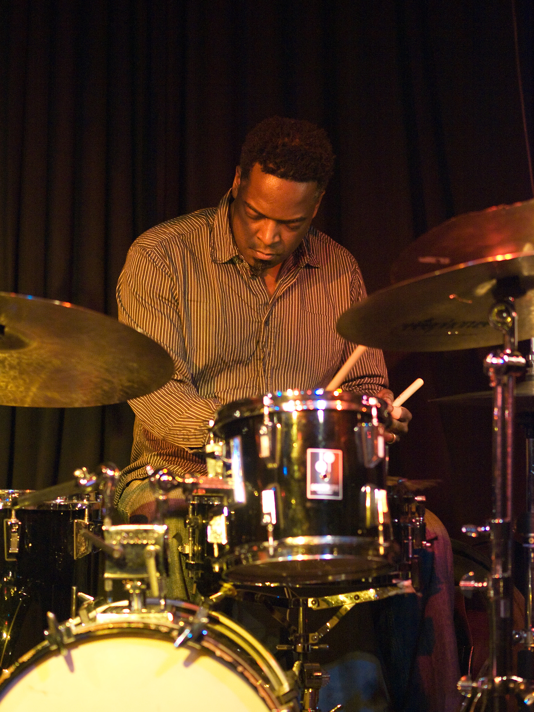 Gerald Cleaver, jazz drummer, picture taken in Jazz club "Unterfahrt" in Munich/Germany